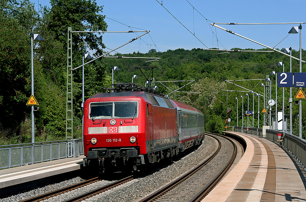 Der EC 115 durchfährt am 20.05.2007 den neuen Bahnhof von Westerstetten, Deutschland.